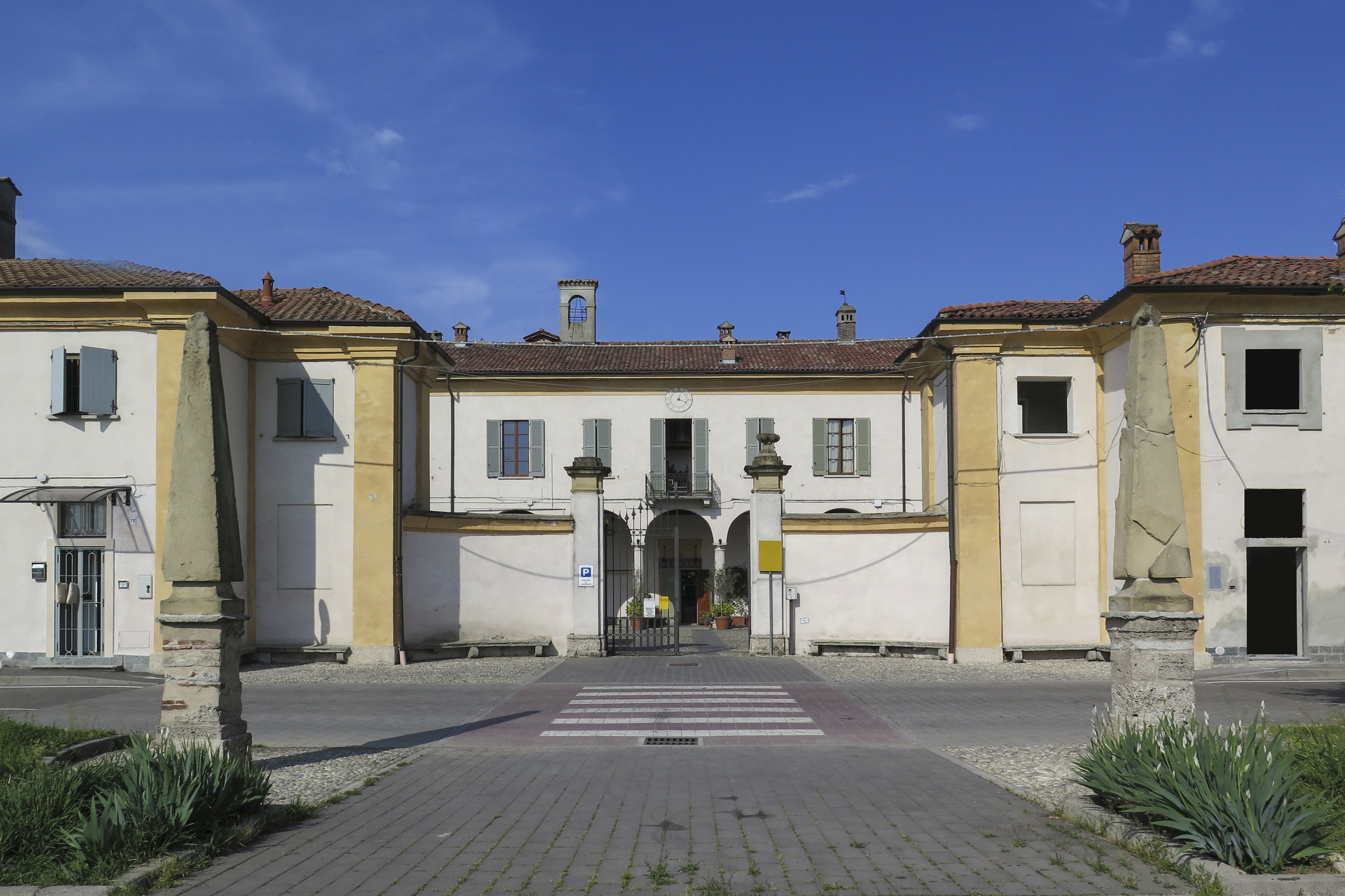 Villa Tizzoni - Ottolini - Brugherio Via Increa - annessa alla Cascina Increa